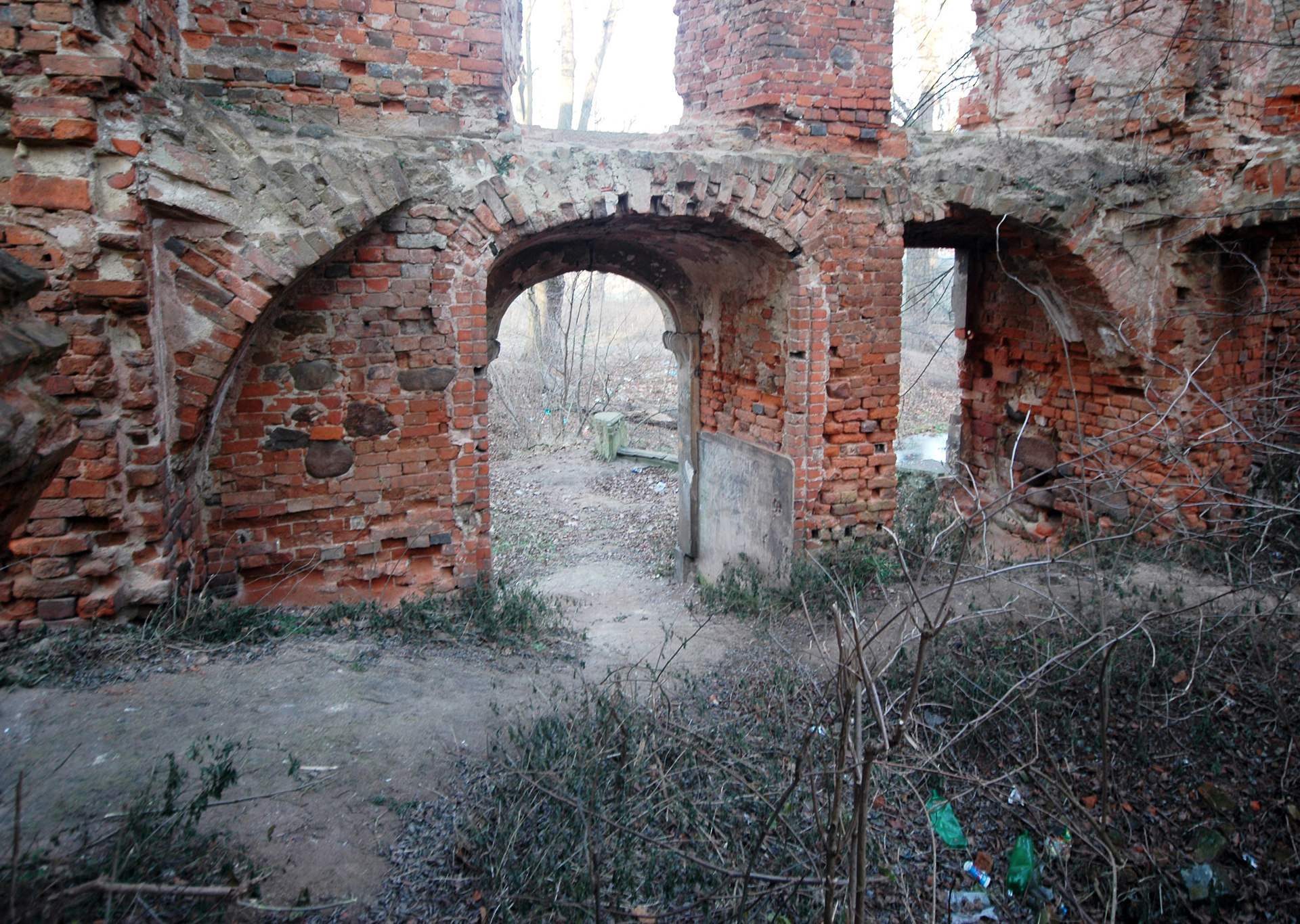 Krzydłowice - pałac (ruina) z parkiem (zabytek nr rejestr. A/2967/173/323/L z dn. 15.03.61)